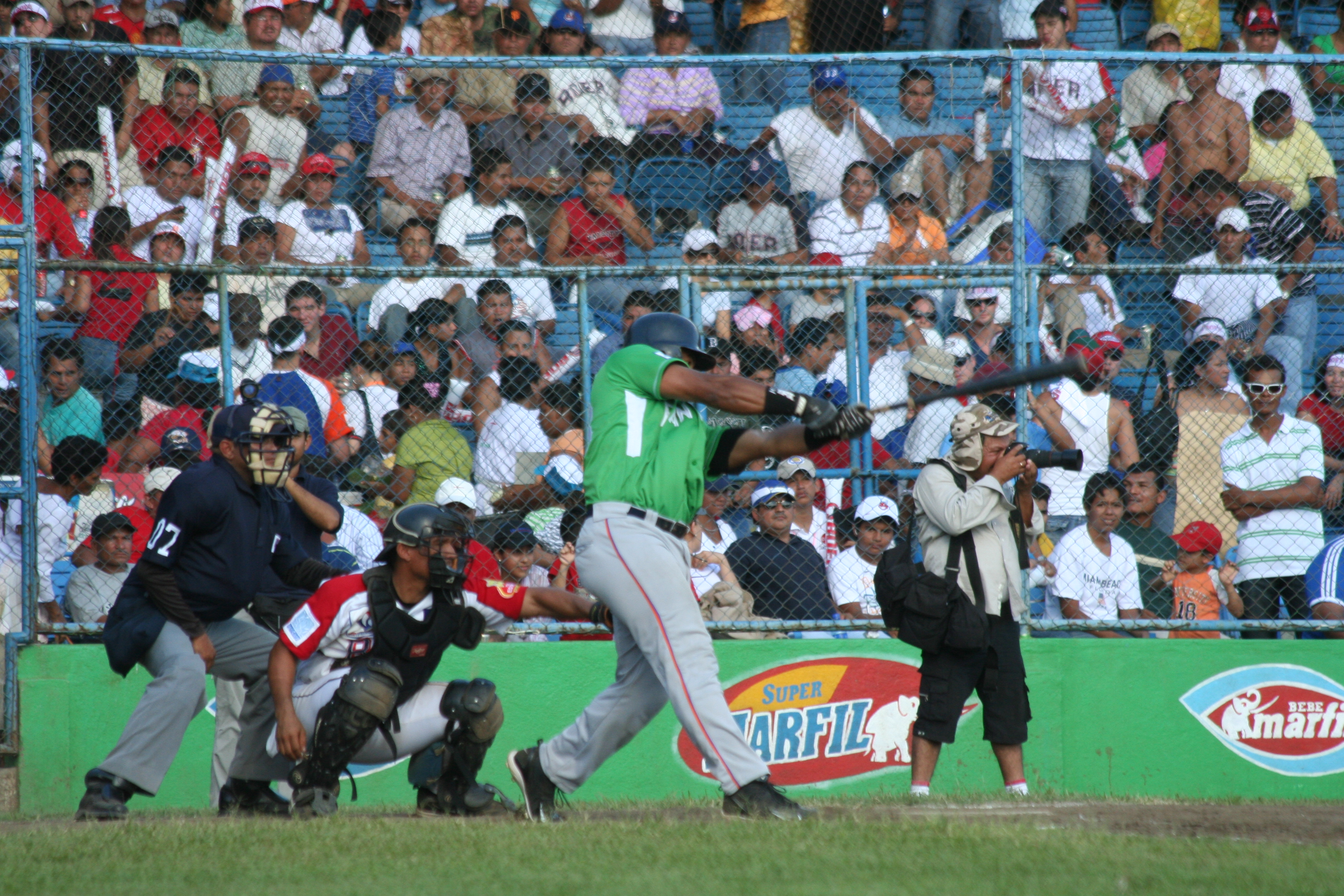 Juego Boer-San fernando. estadio nacional. Mis primeras fotos deportivas